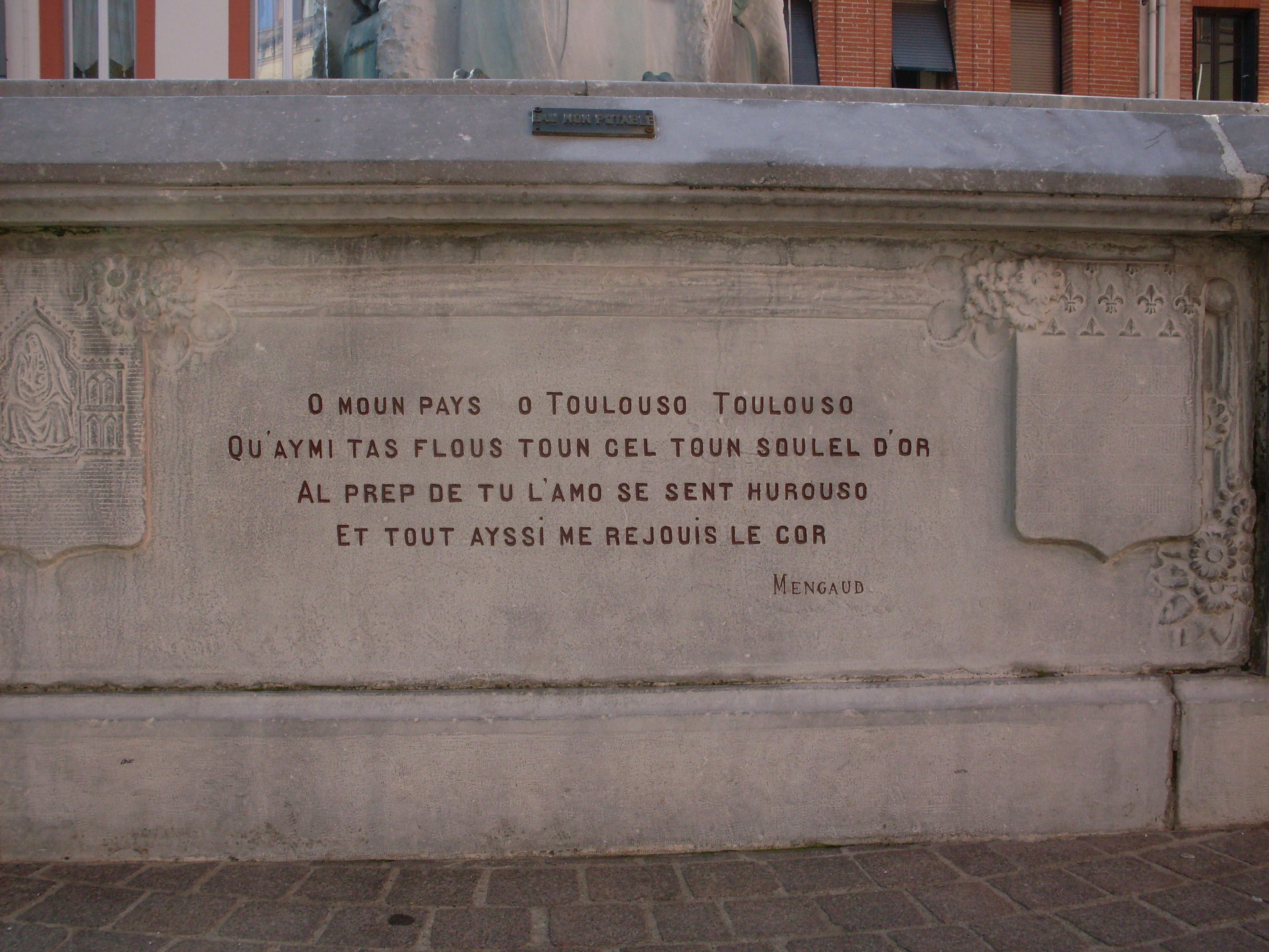 Fontaine place de la Concorde, Toulouse. Sculpture par Léo Laporte-Blairsy 1910. Inscription : O MUN PAYS O TOULOUSO TOULOUSO QU’AYMI TAS FLOUS TOUN CEL TOUN SOULEL D’OR AL PREP DE TU L’AMO SE SENT HUROUSO ET OUT AYSSI ME REJOUS LE COR MENGAUD